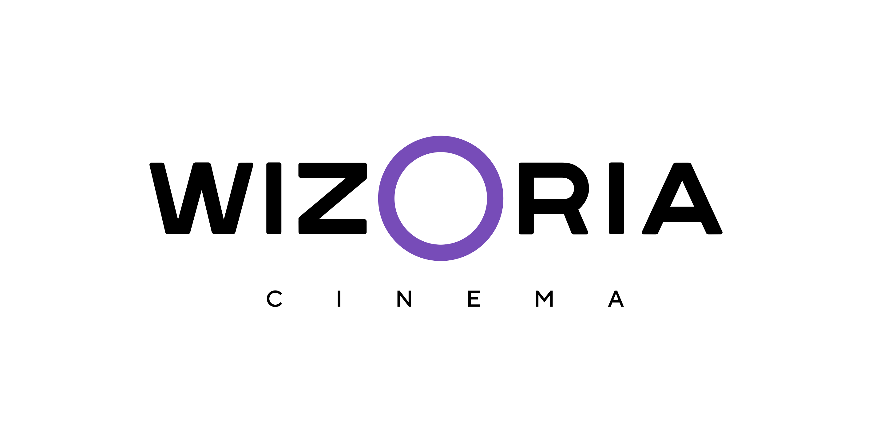 логотип мережі кінотеатрів Wizoria